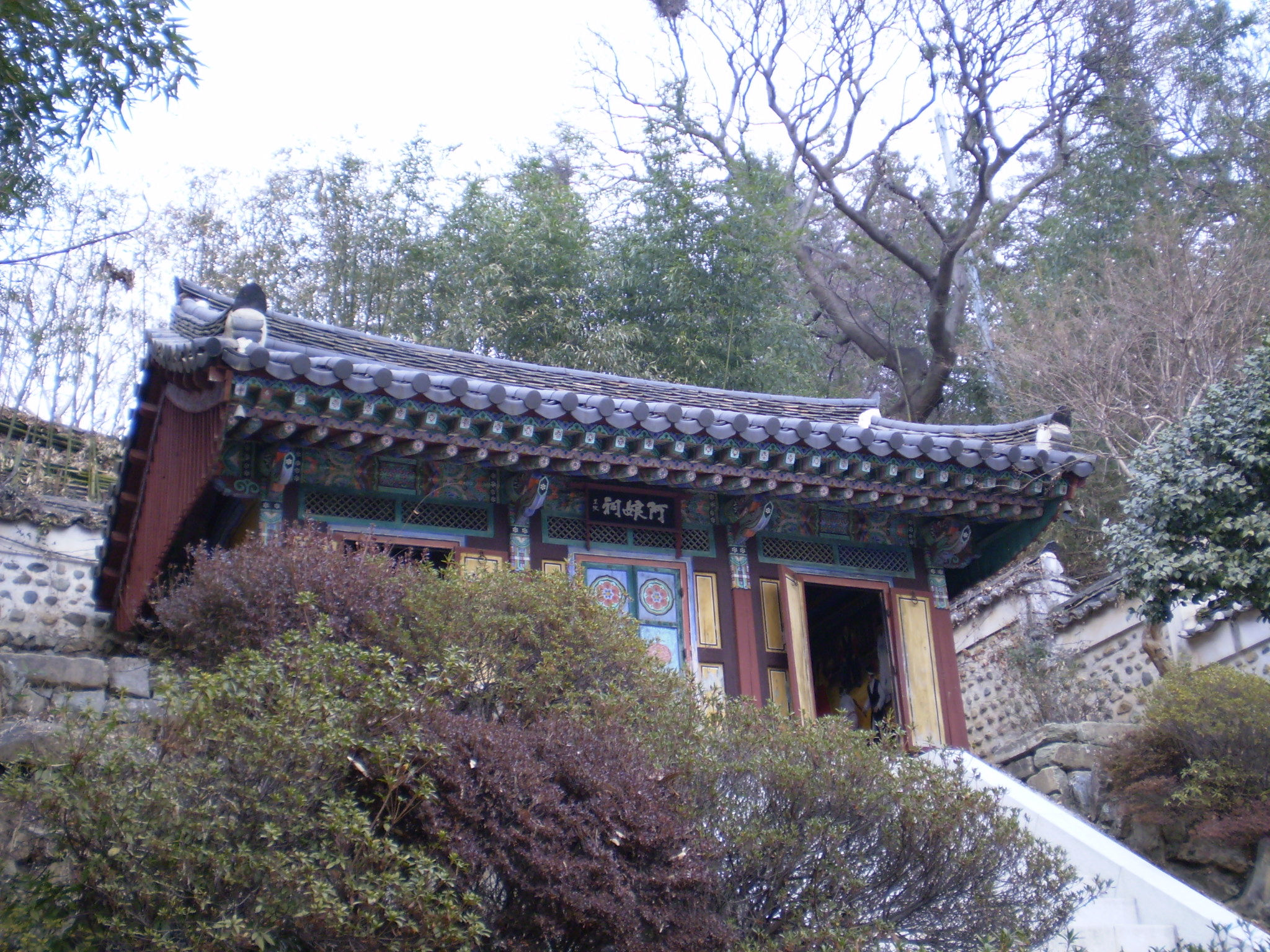 The Aranggak shrine in Miryang, Gyeongsangnam-do, South Korea.